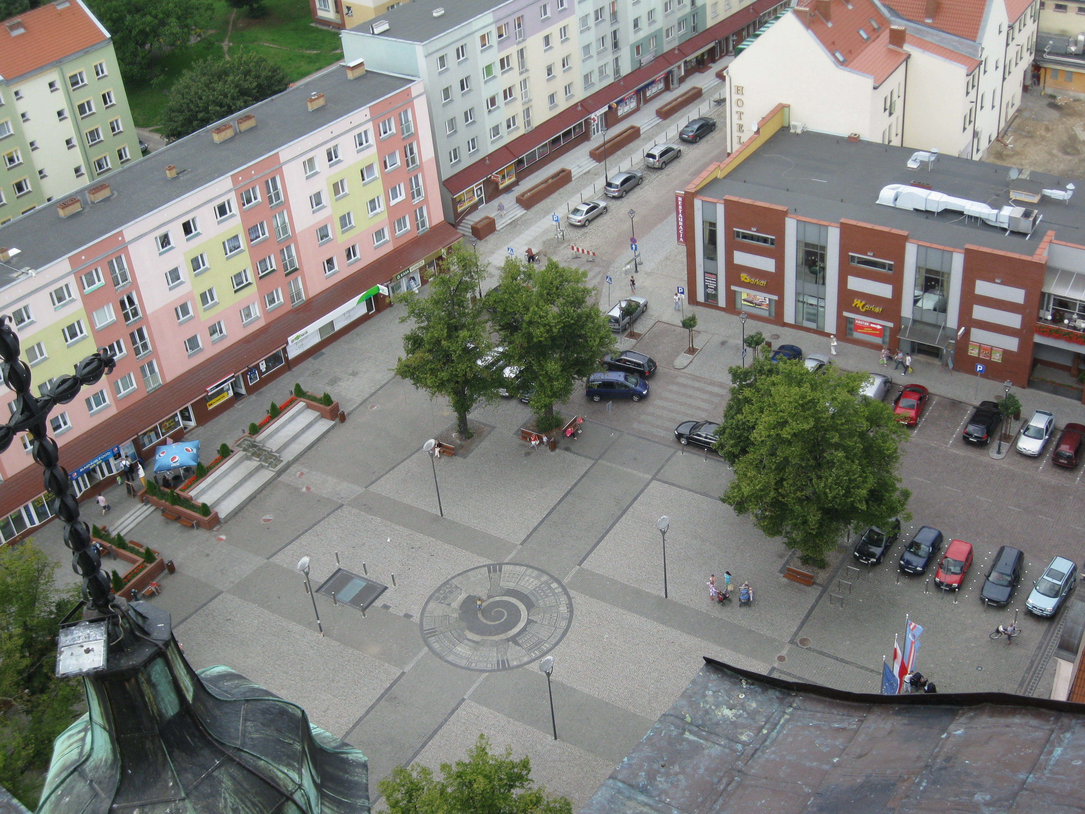 Teren Starego Miasta Stargard Szczeciński, miasto Stargard Szczeciński